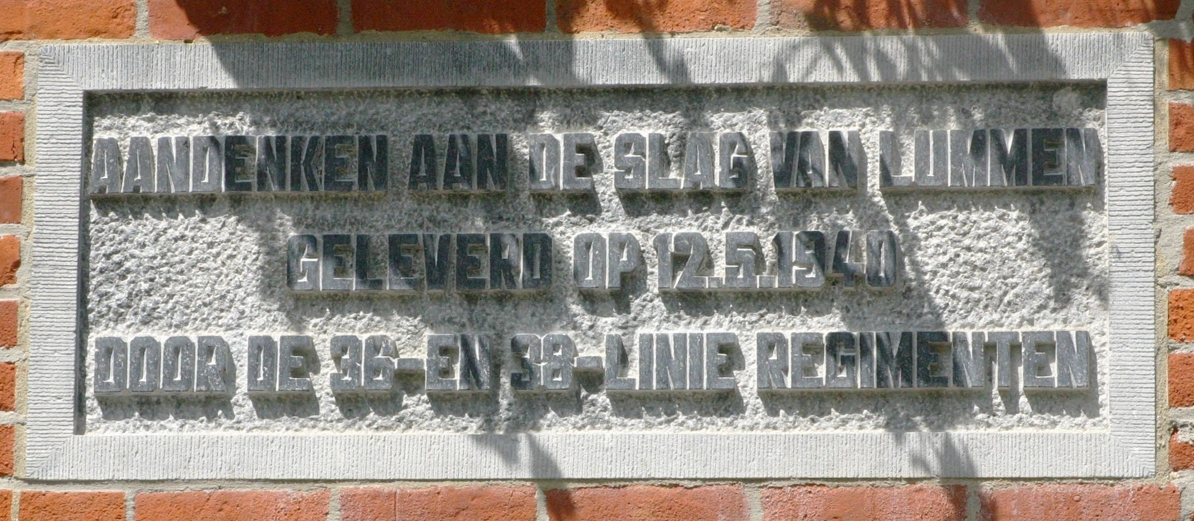 Plack op der Gemeng vu Lummen. Kategorie:Provënz Limburg